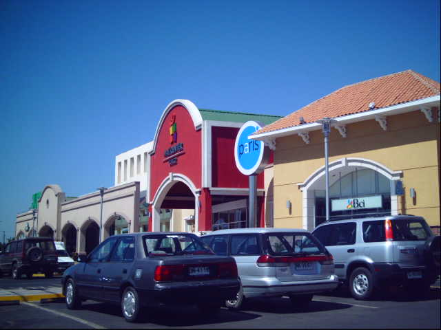 "Mallcenter®", Commercial Center from Curico (Mallcenter®, centro comercial de Curicó)